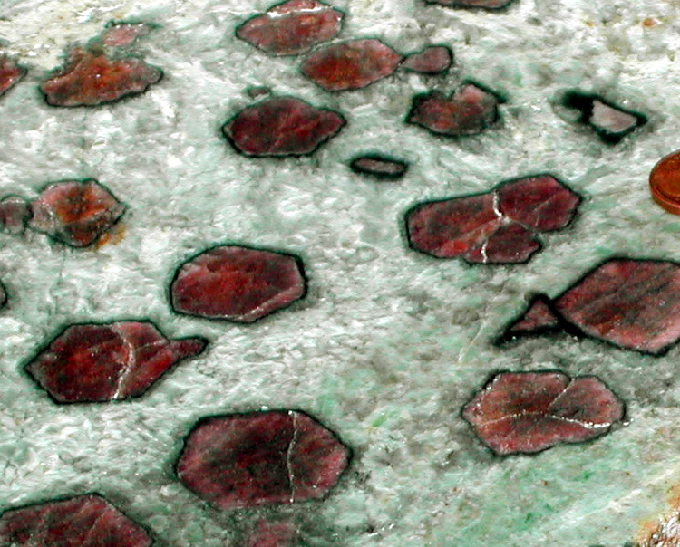 Eclogite, détail, les grenats sont centimétriques sur cet échantillon de St Philbert de Grandlieu, Loire Atlantique (44), FR